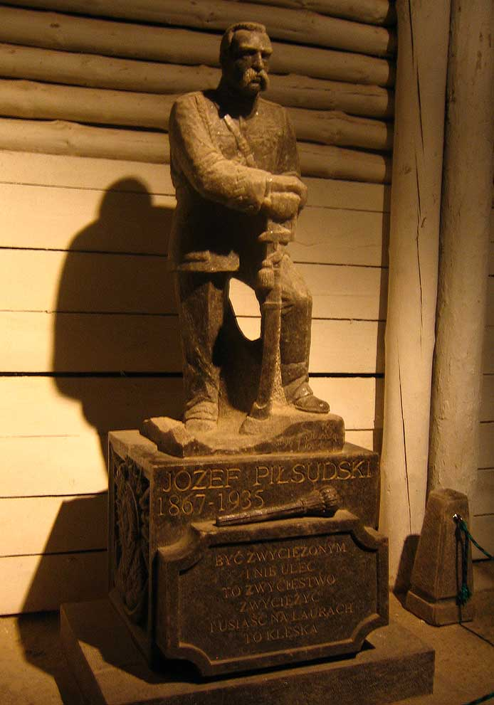 Sculpture of Józef Piłsudski at Wieliczka salt mine, Poland, made by polish miner Stanisław Anioł.